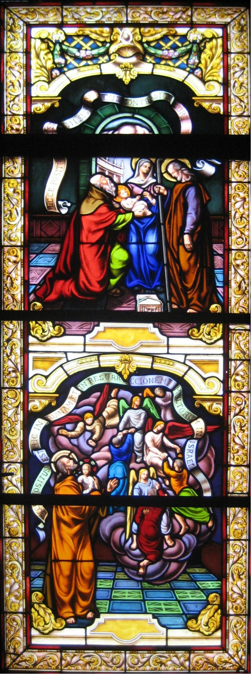 Cuba, Parroquia de San José de Jatibonico: 3-Vitral de la Presentación con Simeón.